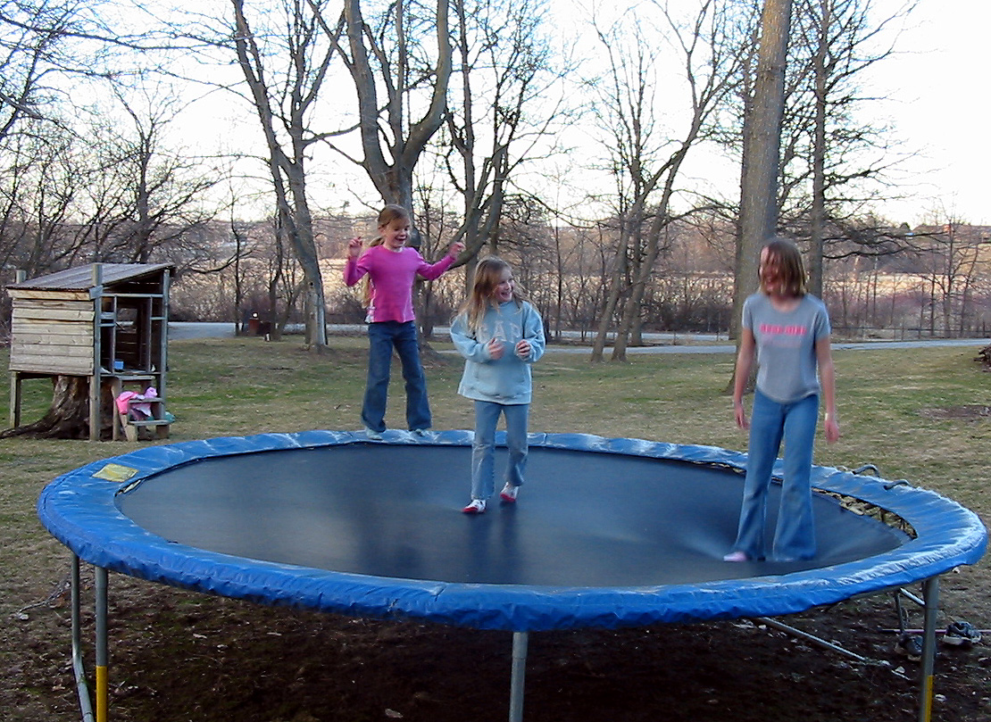 Havetrampolin.